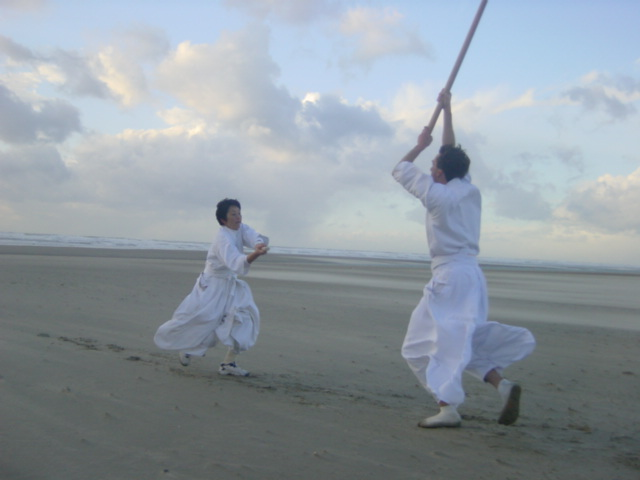 Shintaido France Bokuto Kumité